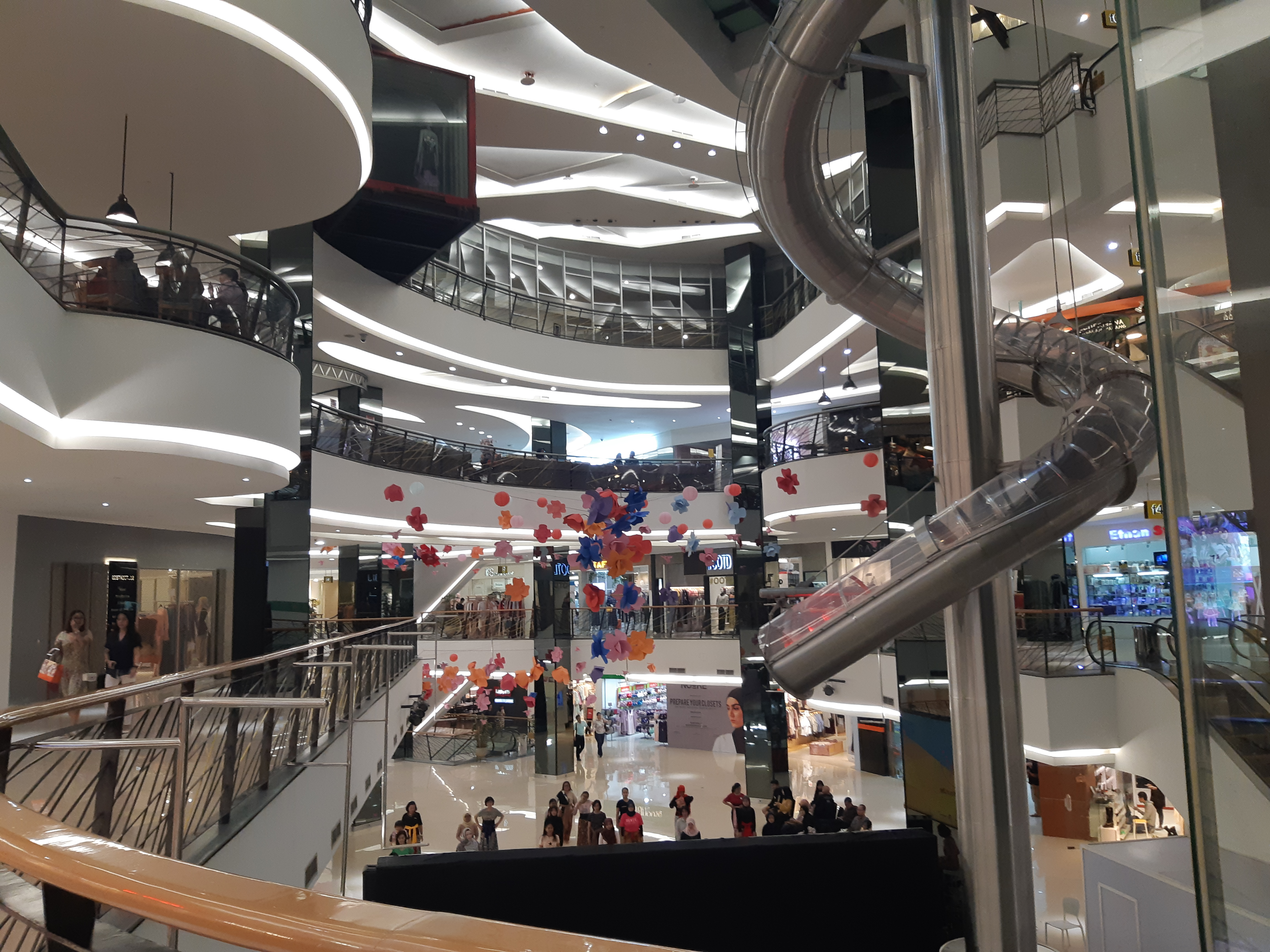 FX Sudirman 2019